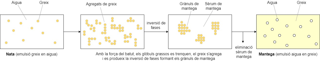 Diagrama de procés de l'etapa de batuda de la nata per elaborar mantega